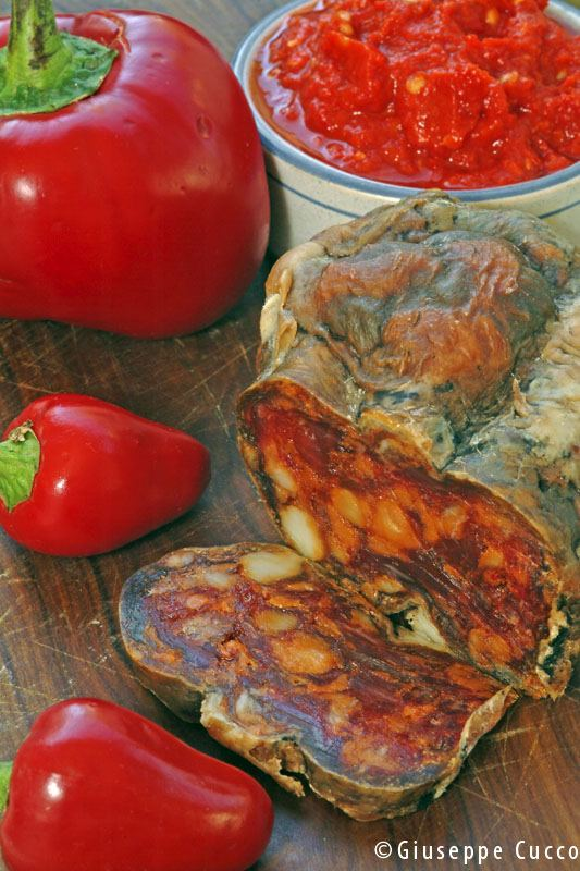 Soppressata di Decollatura, Provincia di Catanzaro – Italia.